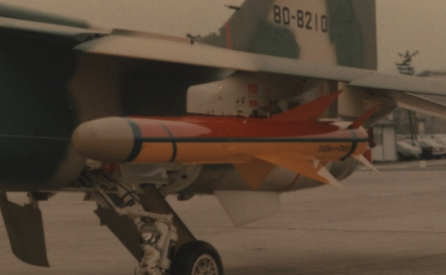 近距離空対艦誘導弾（ＸＡＳＭ－１）（現在の８０式空対艦誘導弾（ＡＳＭ－１））の実用試験 昭和５４年（１９７９年）８月～５５年（１９８０年）３月